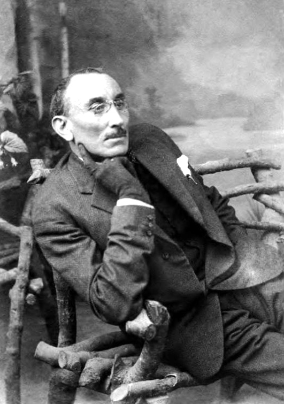 Xoán Bautista Andrade